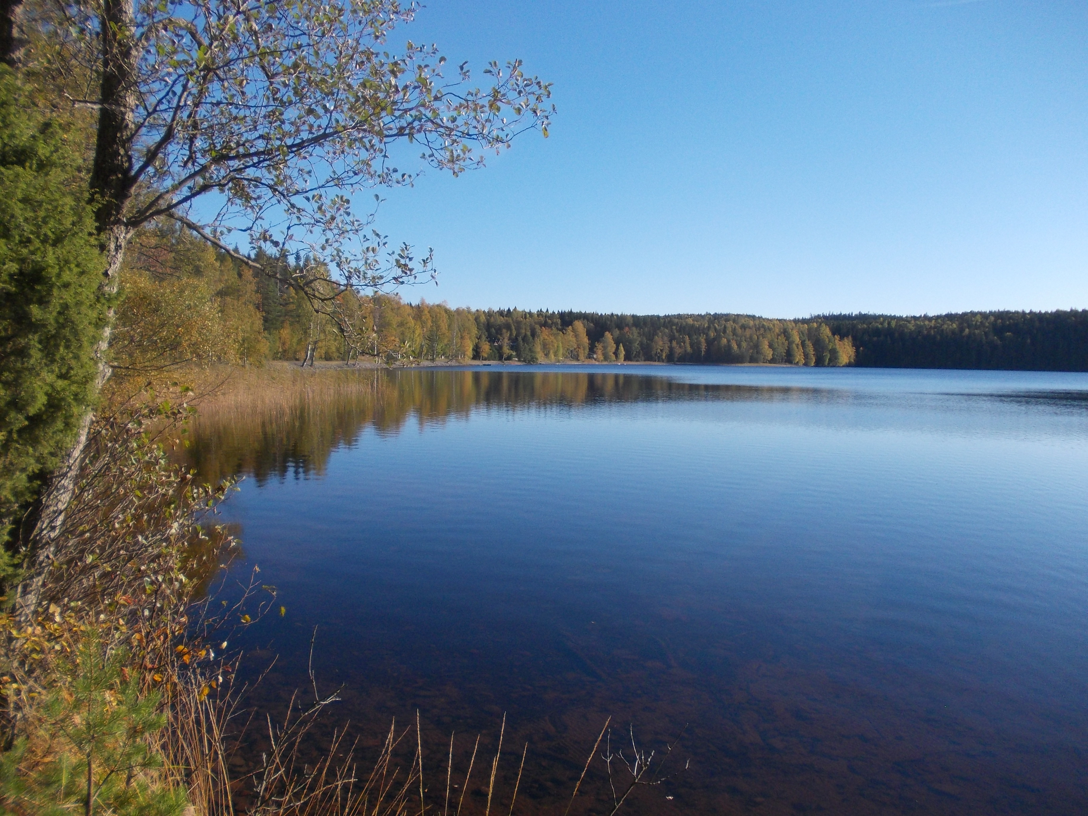 Sjön Grecken är en ganska stor sjö i Nora kommun.